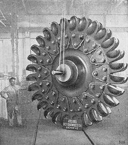 Werbung von Ateliers des Charmilles SA mit Pelton-Turbine des SBB-Kraftwerks Vernayaz